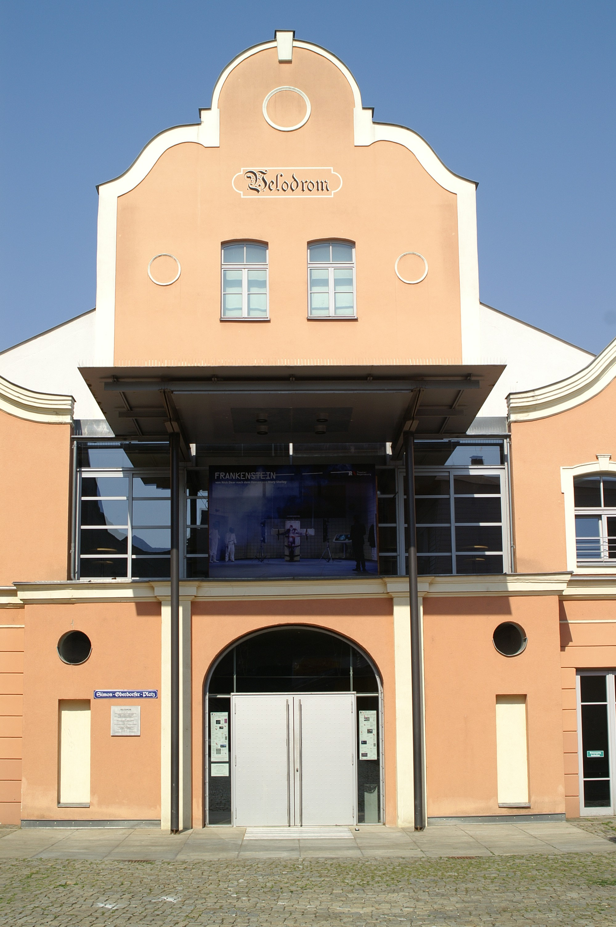 Velodrom am Arnulfsplatz, eine Spielstätte des Theaters Regensburg